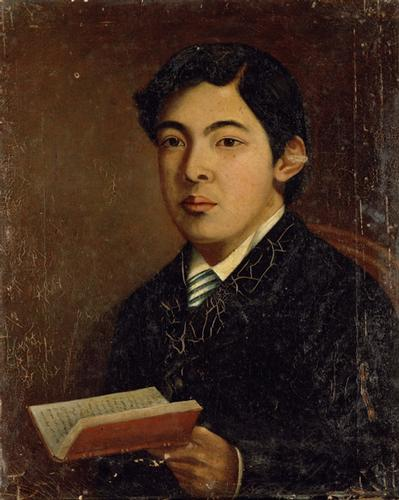 国沢新九郎(1848 - 1877)は、明治]期の洋画家・洋画塾の長。